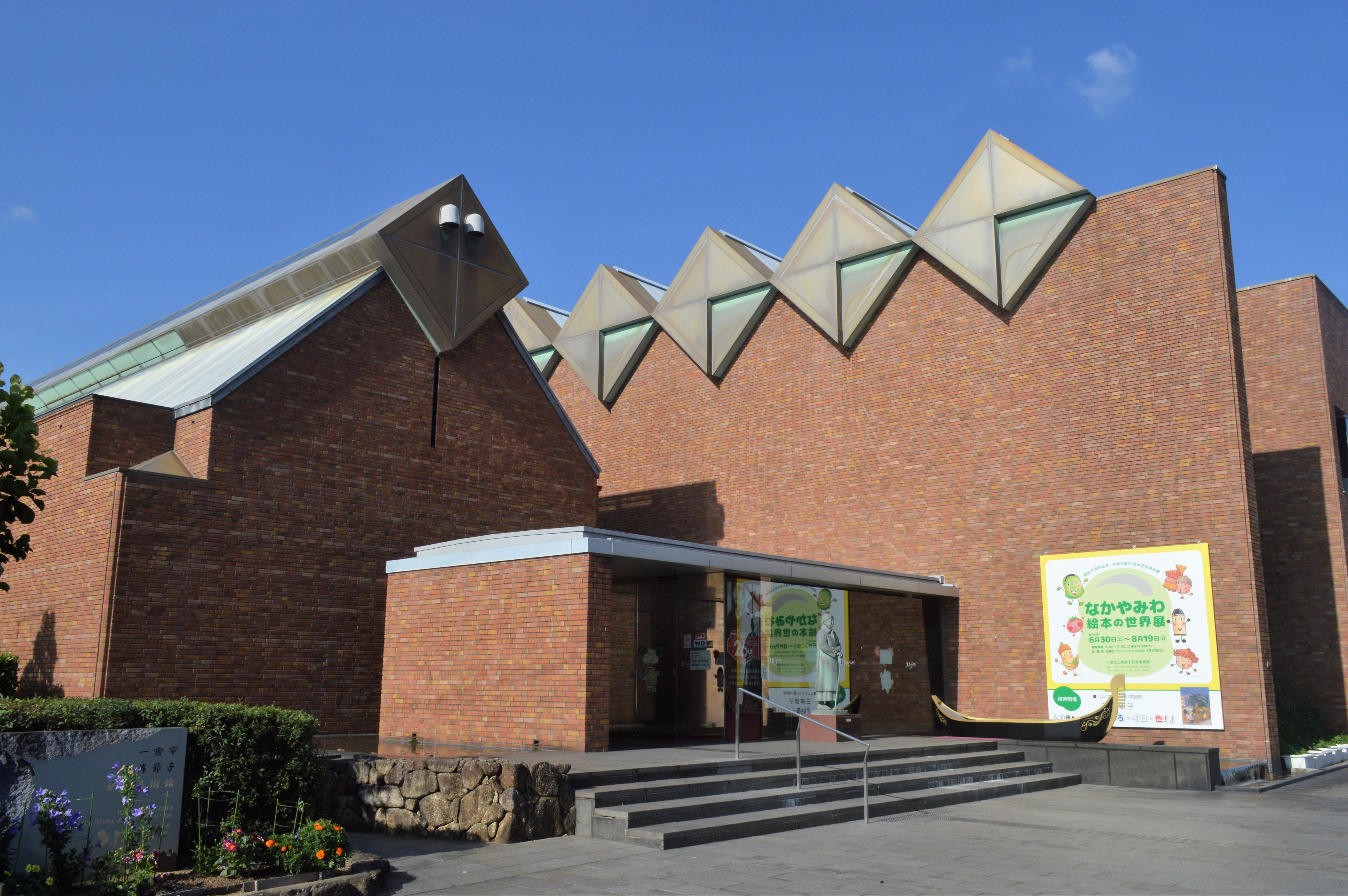 愛知県一宮市の三岸節子記念美術館。